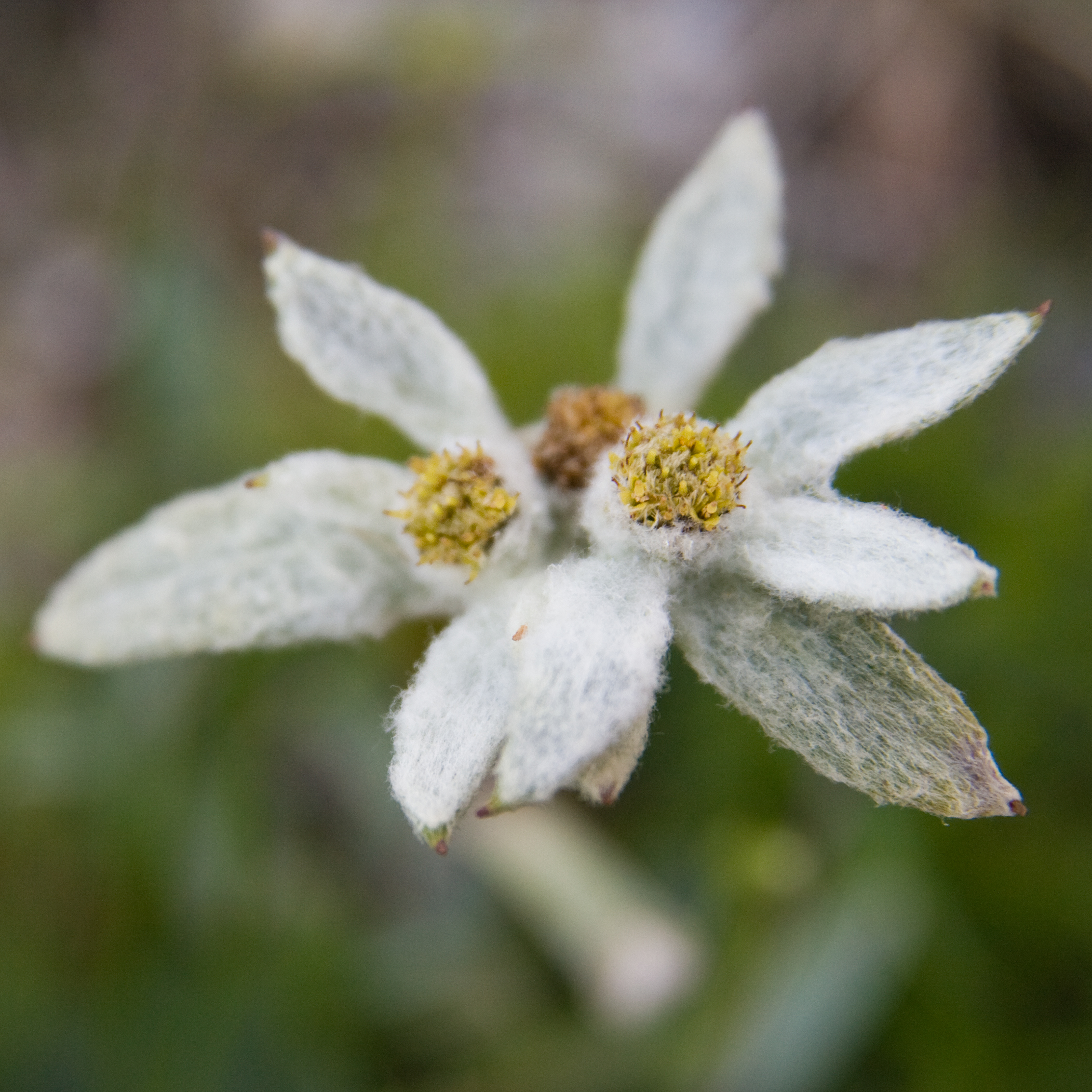 ヒメウスユキソウ (学名:Leontopodium shinanense)